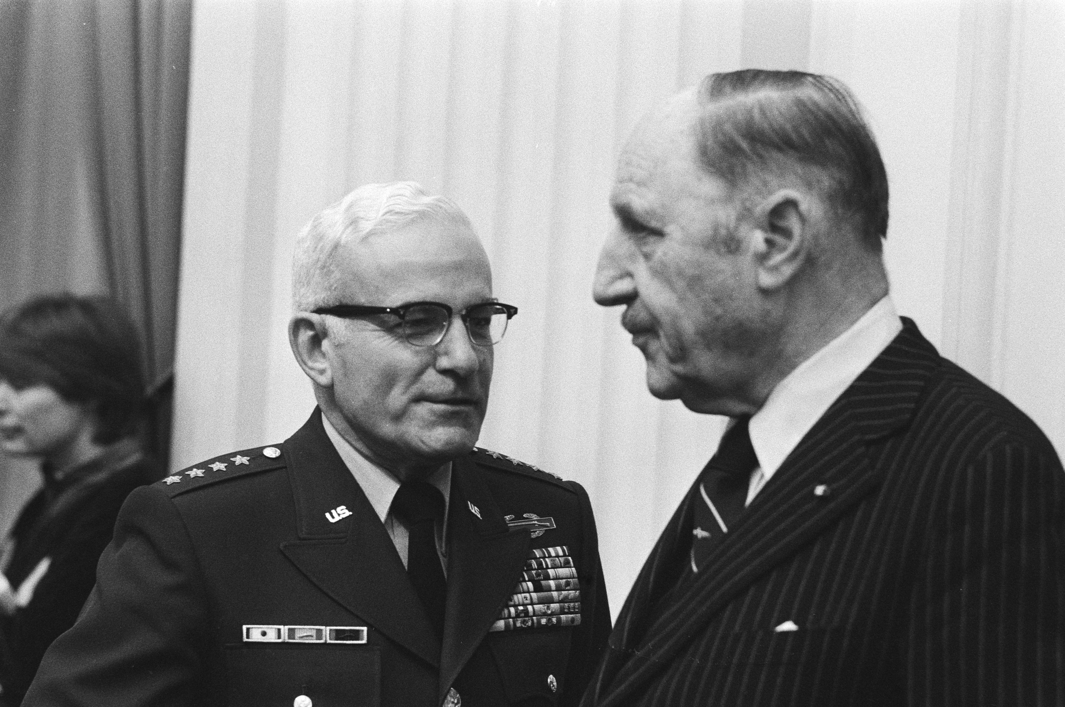 Collectie / Archief : Fotocollectie Anefo Reportage / Serie : Hoorzitting in de Tweede Kamer over nieuw te plaatsen kernwapens, waar generaal Rogers (opperbevelhebber van de NAVO) en mr. Luns (secretaris-generaal van de NAVO) worden gehoord Beschrijving : Generaal Rogers (l) en Luns Datum : 13 januari 1983 Locatie : Den Haag, Zuid-Holland Trefwoorden : bewapening, groepsportretten, wapens Persoonsnaam : Luns, J.A.M.H., Luns, Joseph Fotograaf : Croes, Rob C. / Anefo Auteursrechthebbende : Nationaal Archief Materiaalsoort : Negatief (zwart/wit) Nummer archiefinventaris : bekijk toegang 2.24.01.05 Bestanddeelnummer : 932-4627